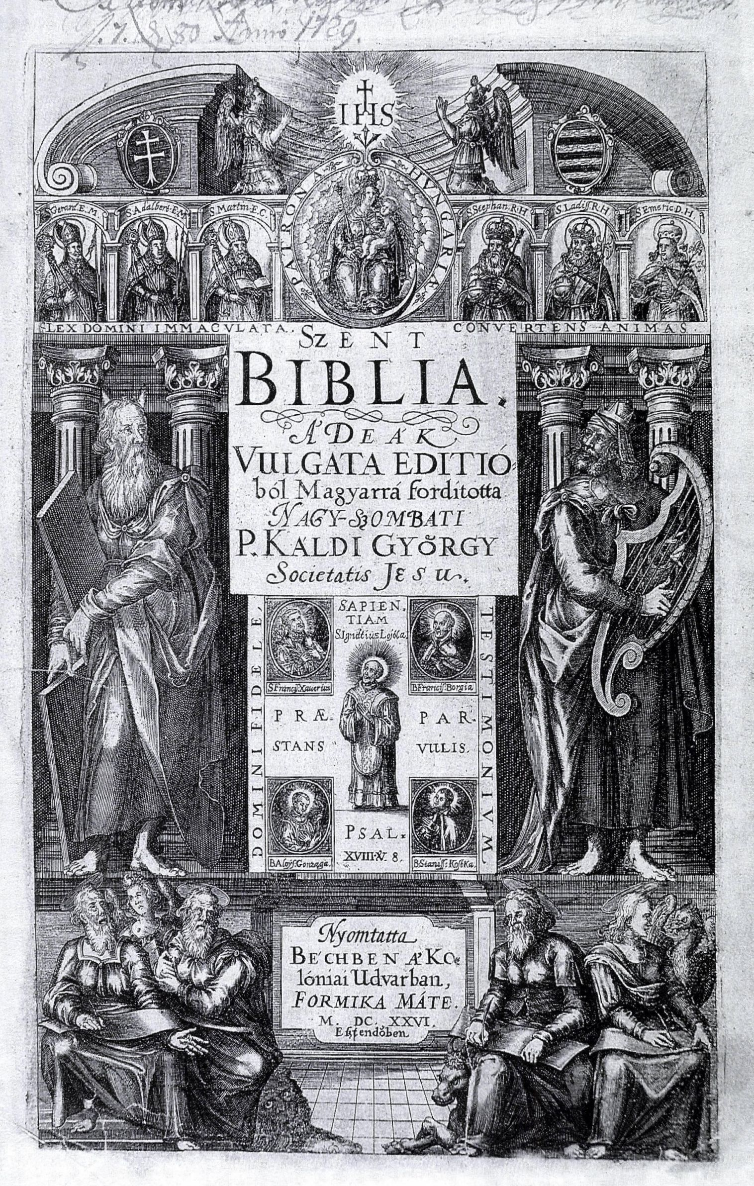 Káldi György bibliafordításának (Bécs, 1626) címlapja (Országos Széchényi Könyvtár, Régi Nyomtatványok Tára, jelz.: RMK I 551) National Széchényi Library LocationBudapestCoordinates47° 29′ 53″ N, 19° 02′ 14″ E Established1802Website control VIAF: 157919295 ISNI: 0000 0001 1781 8798 ULAN: 500306655 NLA: 35722893 GND: 1007496-X